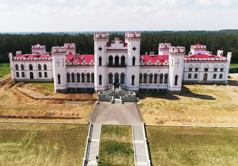 Косаўскі палац Пуслоўскіх пасля завяршэння галоўных конкавых рэстаўрацыйных прац. Выгляд 2017-2018